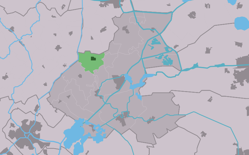 Kaartsje fan himrik fan Reduzum